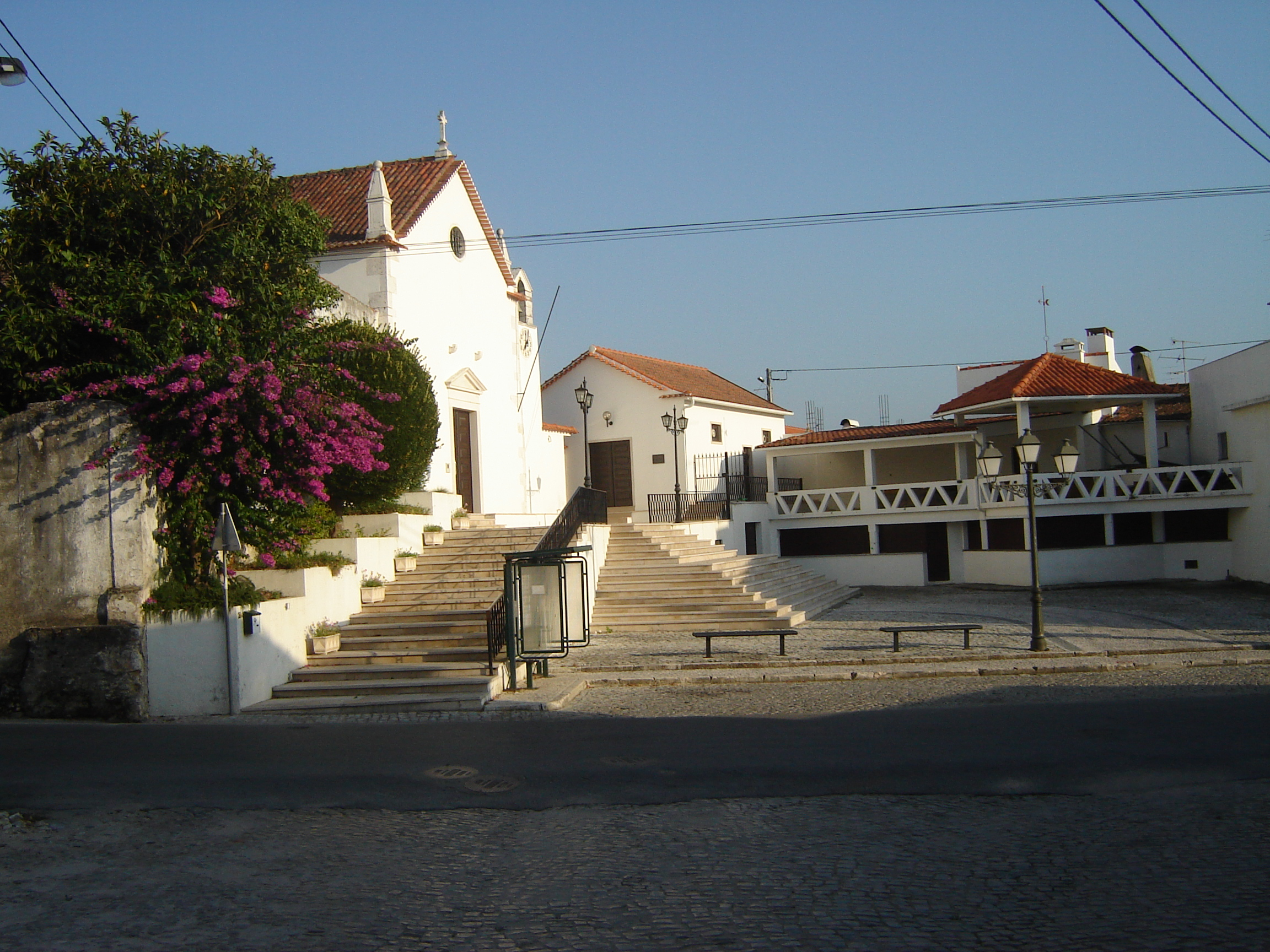 Praça da Igreja na aldeia da Póvoa na freguesia de Cós